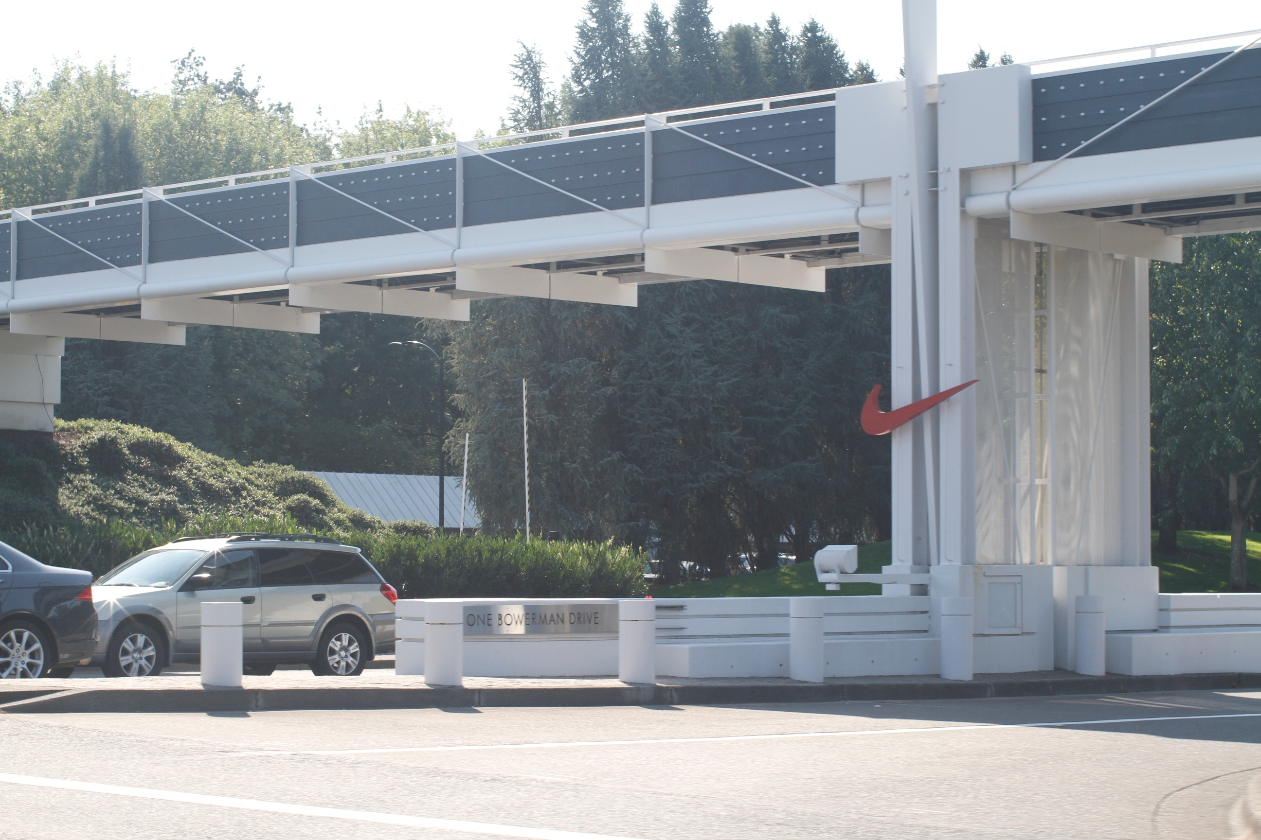 Chopperz 86